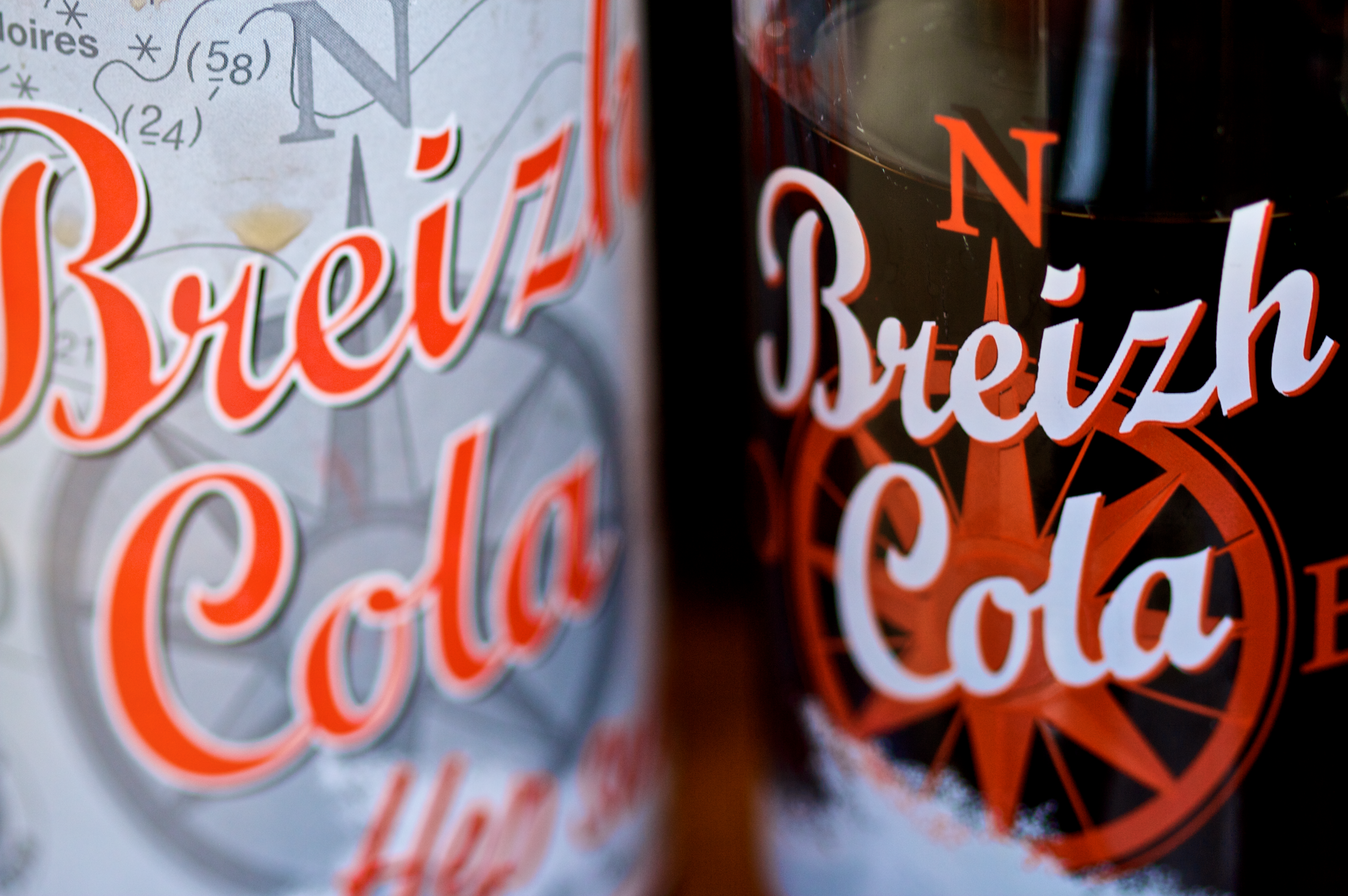 Breizh Cola in London